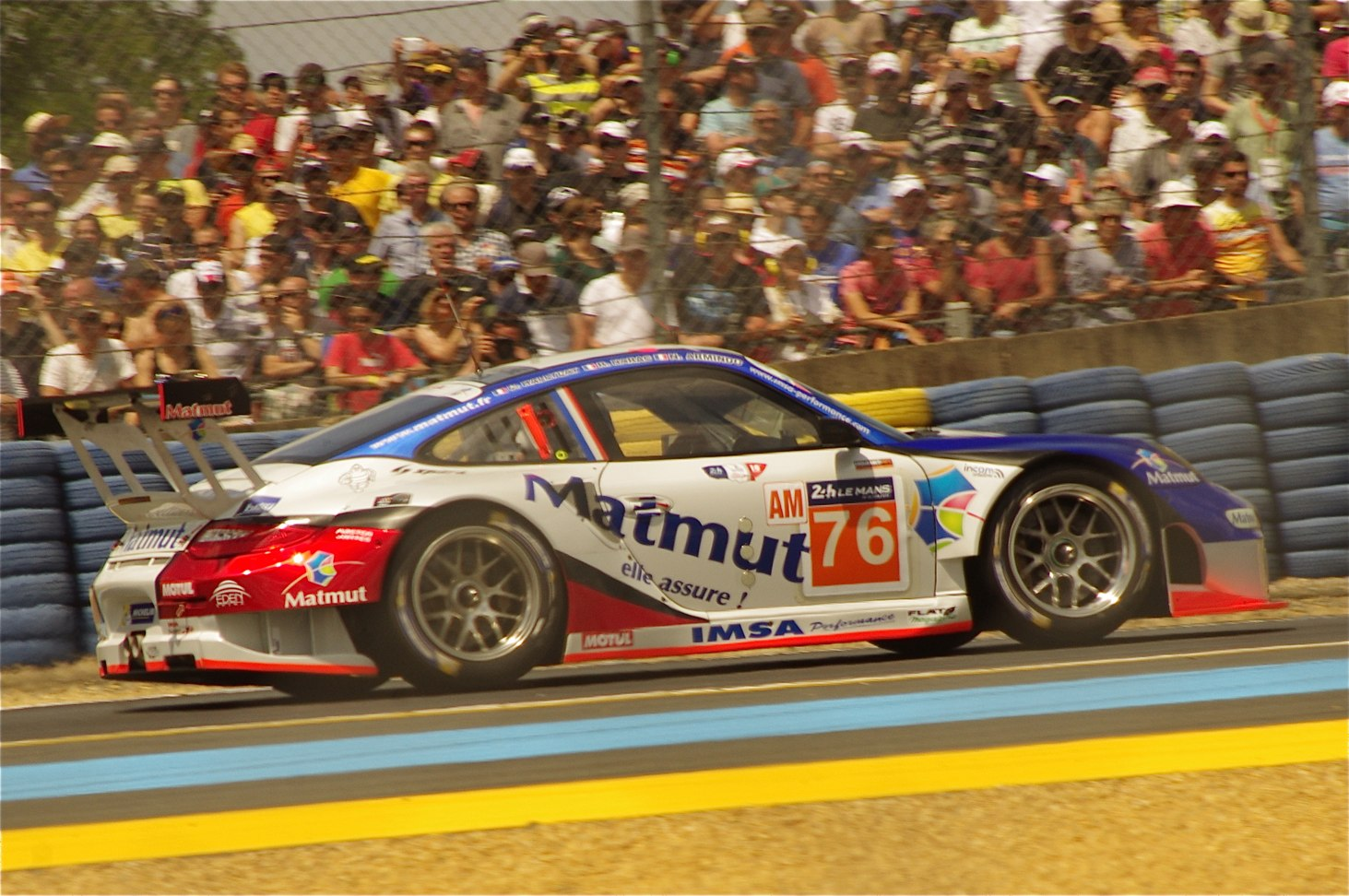 Le Mans 24 Hours 2014